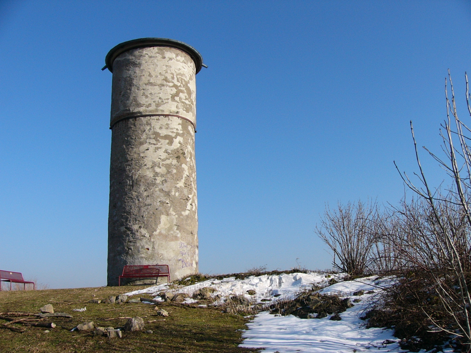 Wartturm in Hof, verschiedene Ansichten